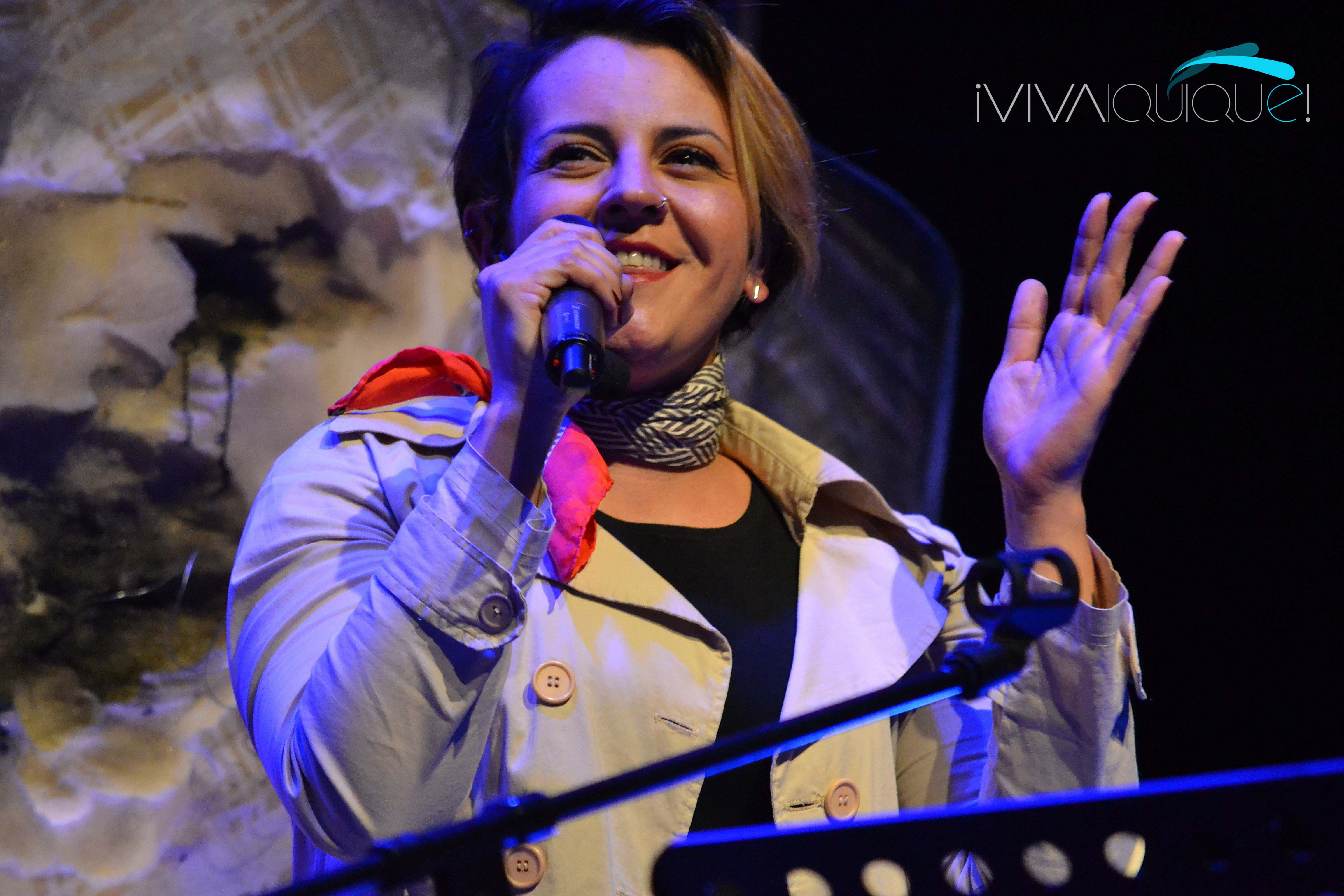 Fotografías: Gabriel Muñoz Ubal.